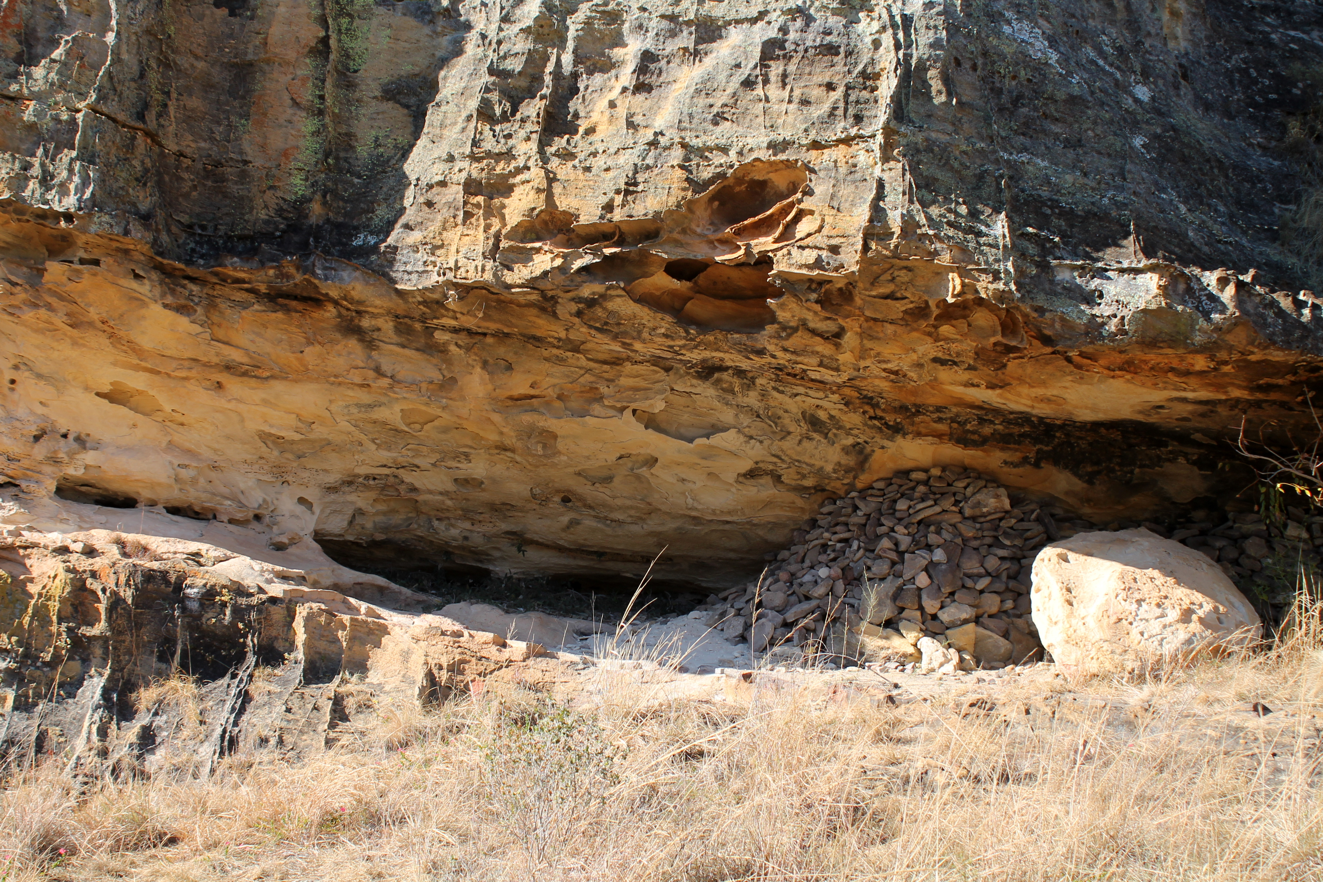 Bara-graf in Isalo